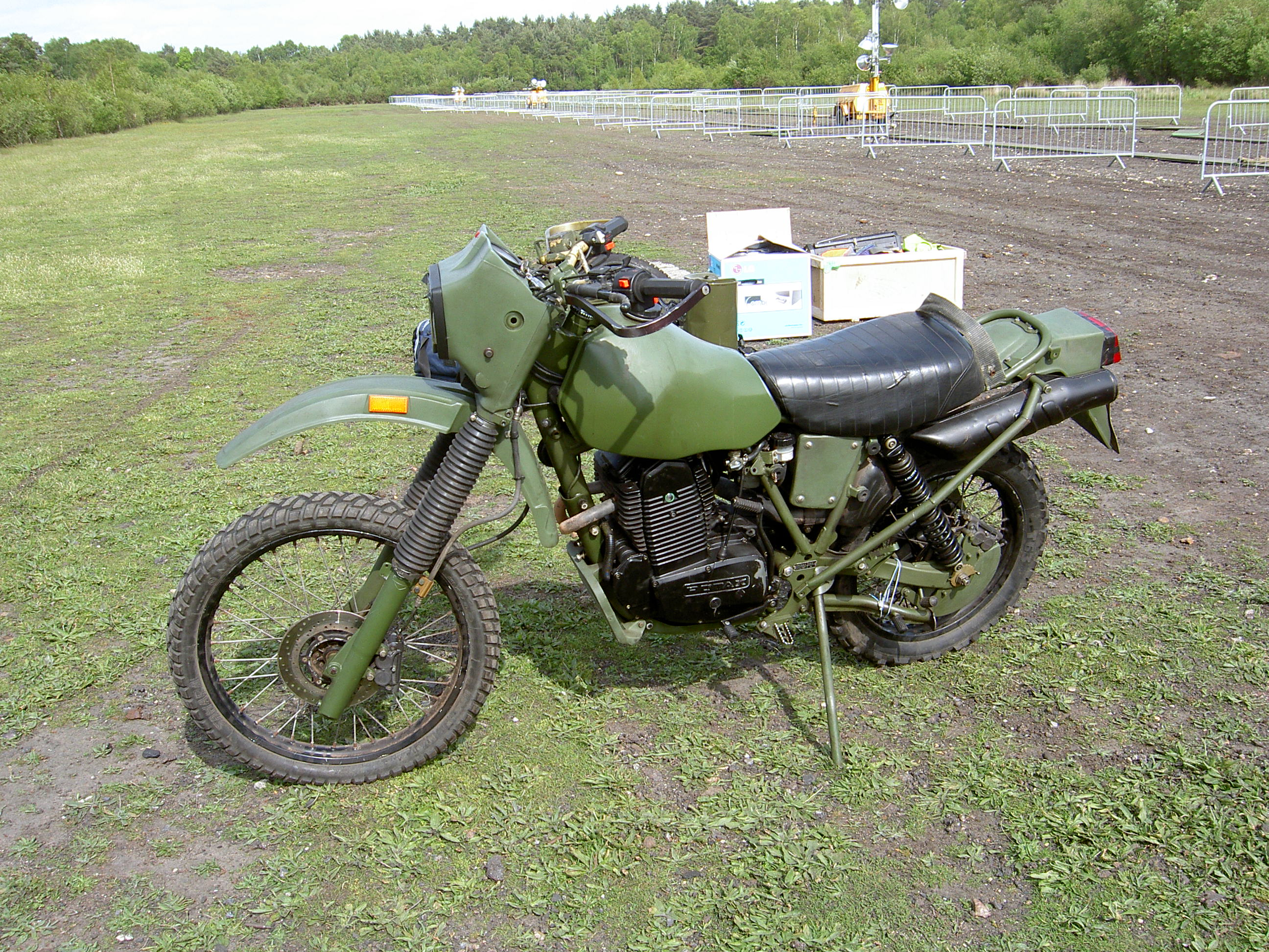 Toestemming van Rene van de Ent